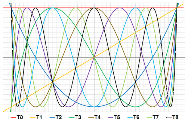 Wykres wielomianów Czebyszewa w zakresie od -1,1 do 1,1